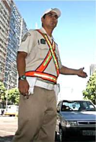 Municipal Guard of Rio de Janeiro - Brazil